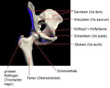 Hüft-Becken-Modell (beschriftet)